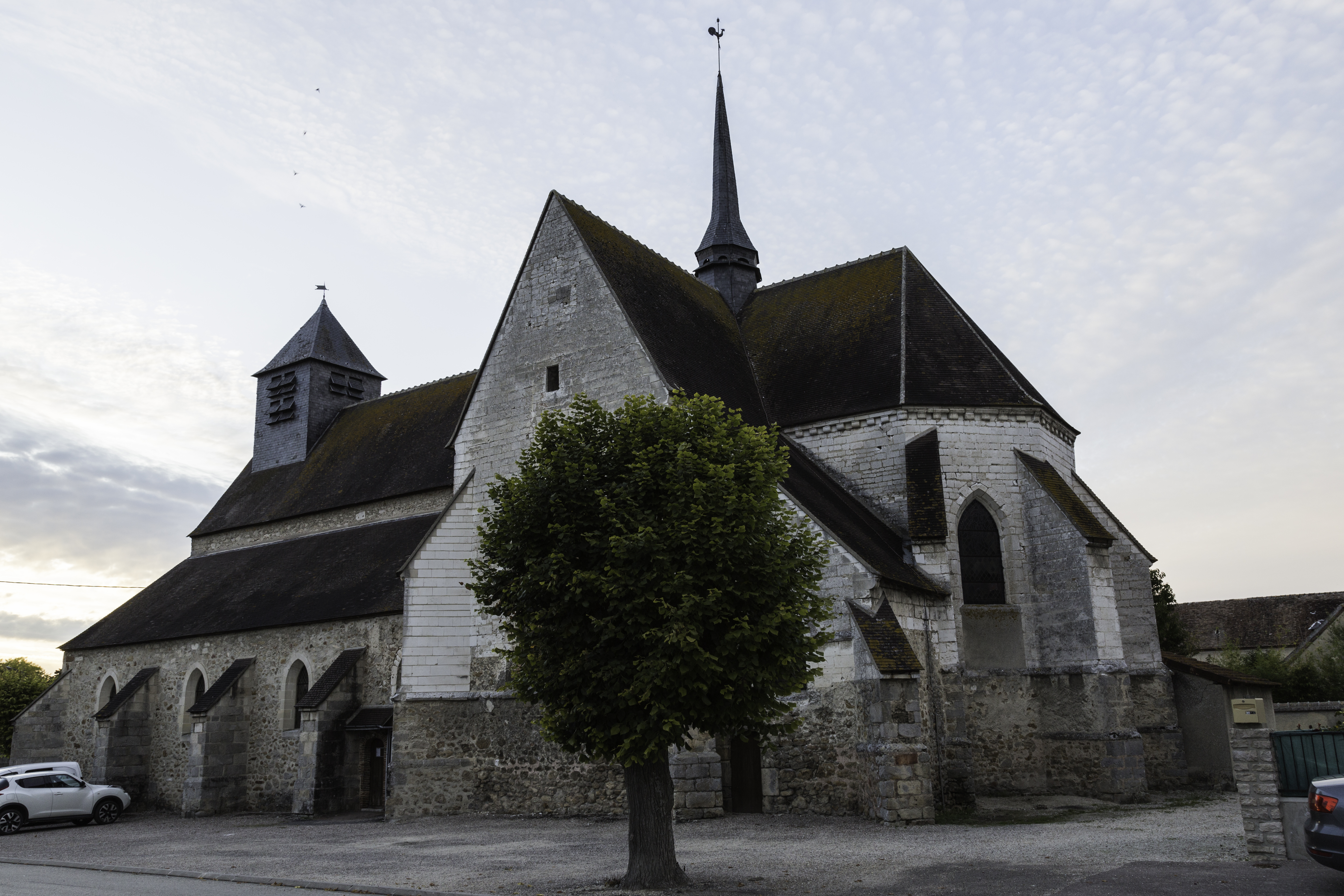 Église Saint-Antoine d'Anglure .